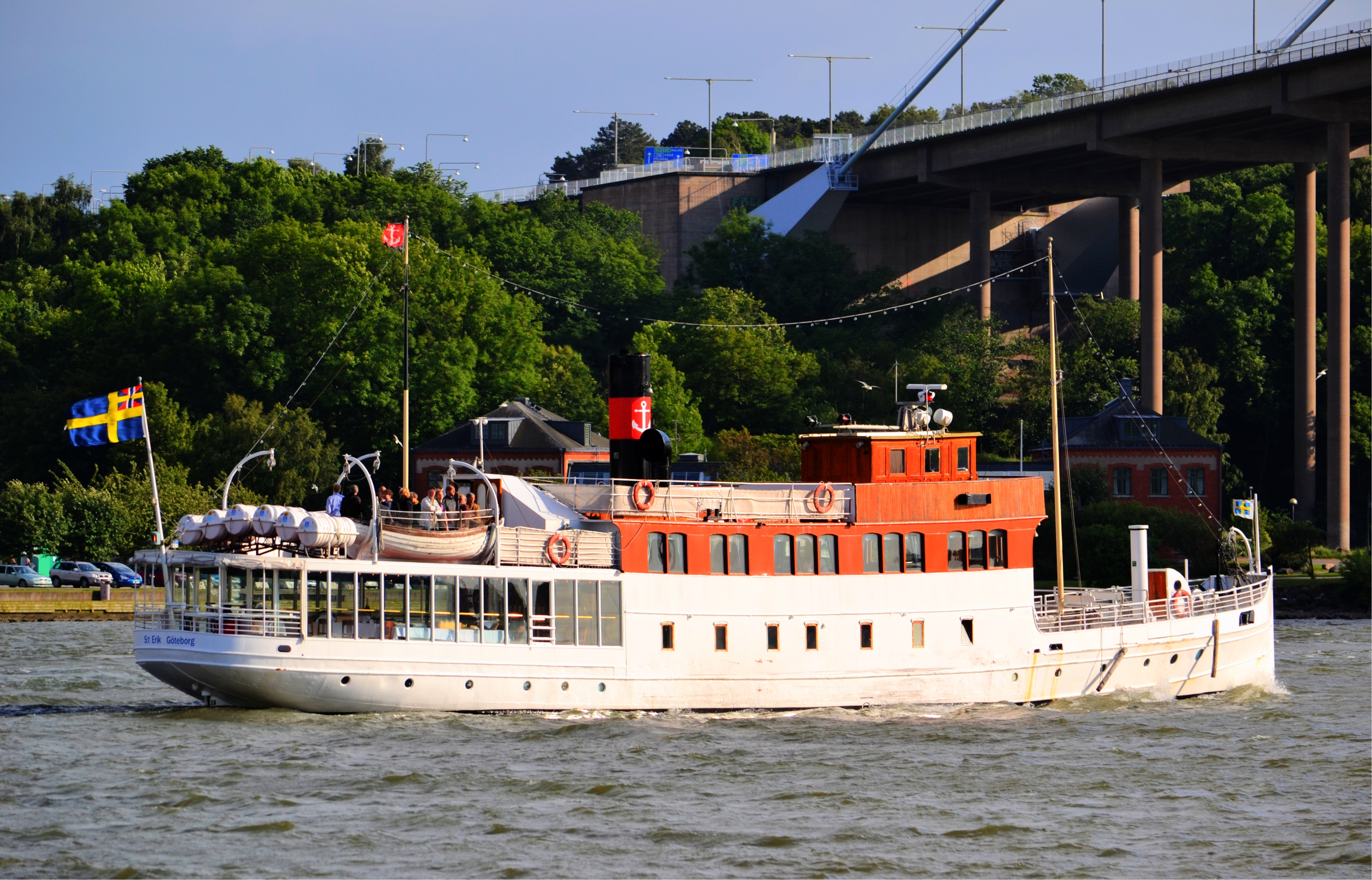 M/S S:t Erik Vid Älvsborgsbron